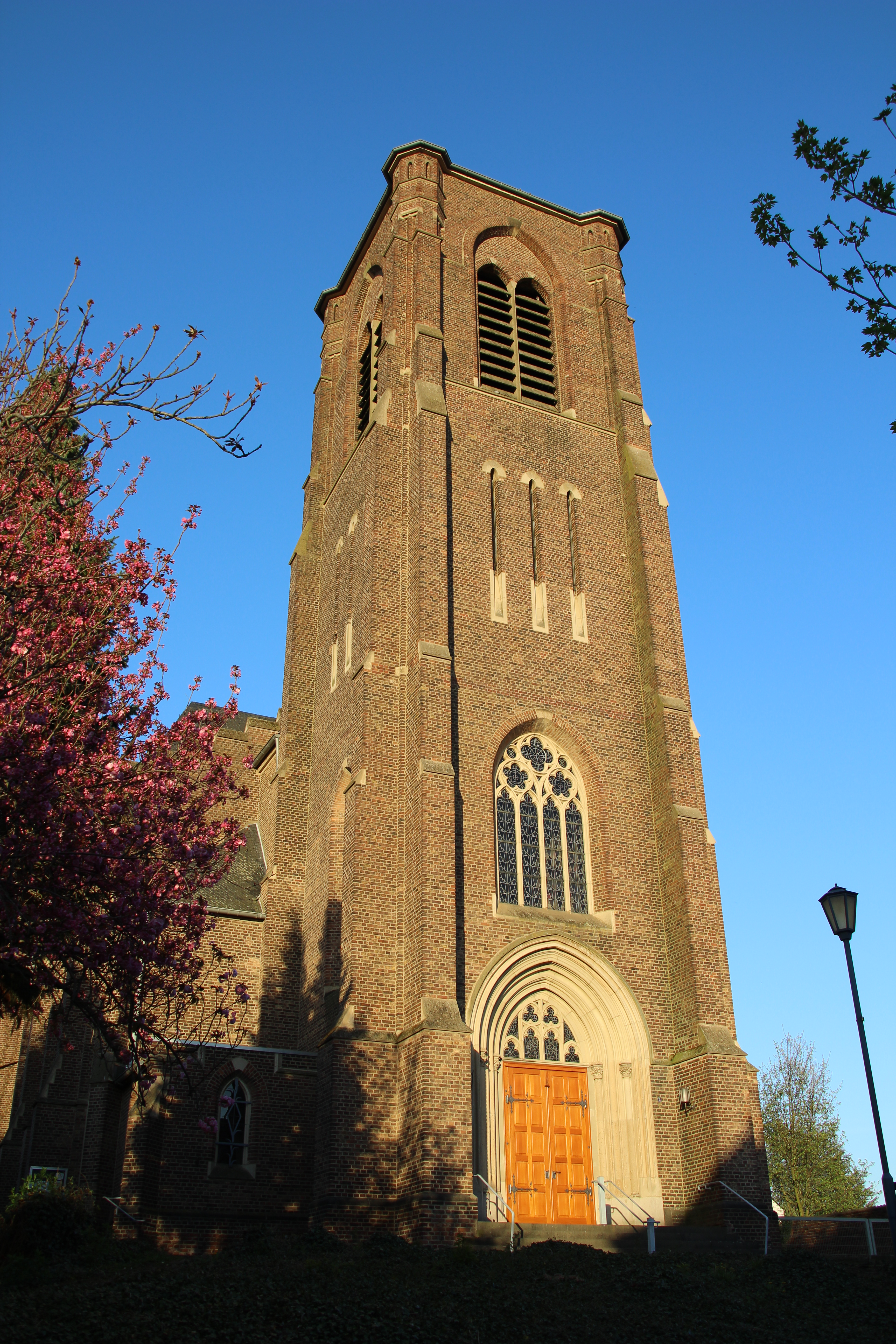 Westseite der Kath. Pfarrkirche St. Laurentius in Merzenich.